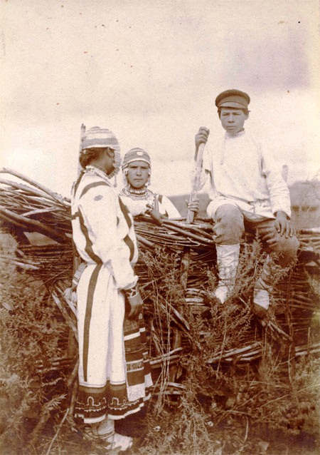 средненизовые чуваши "анат енчи"